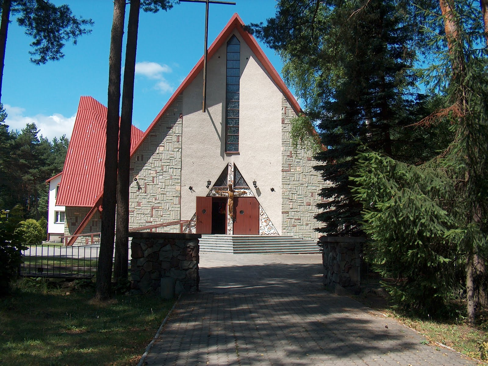 Polska - Zwierzyniec kościół pomnik p.w Matki Bożej Królowej Polski.